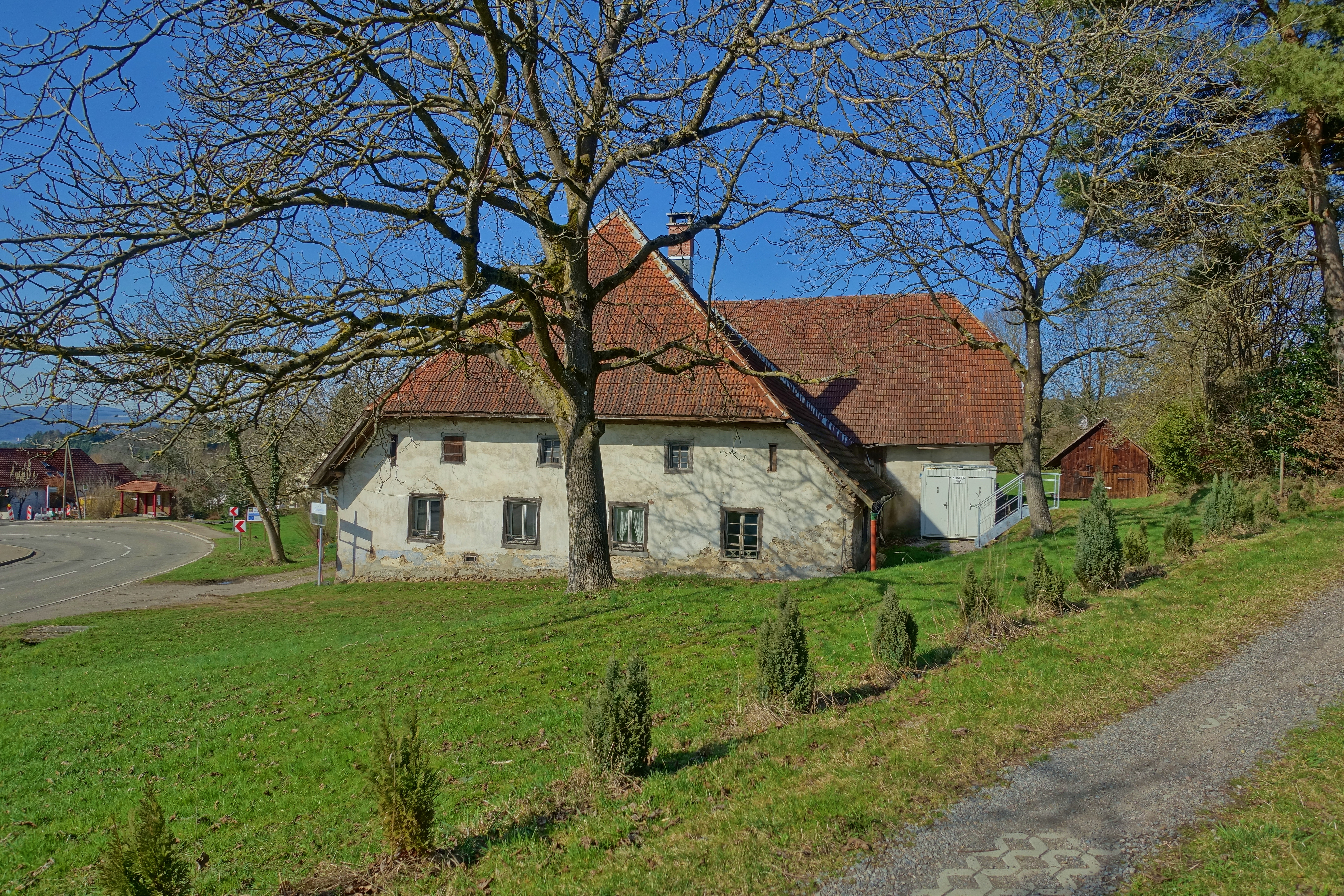 Das 1748 erbaute Zechenwihler Hotzenhaus auf der Gemarkung Zechenwihl in Murg-Niederhof ist eines der letzten seiner Art und soll zur Kulturstätte umgebaut werden. Das Zechenwihler Hotzenhaus ist als typisches Schwarzwaldhaus ein einzigartiges Zeitzeugnis. Obwohl es in der Vergangenheit mehrfach umgebaut wurde, ist das fast 300 Jahre alte Haus noch weitgehend im Originalzustand.